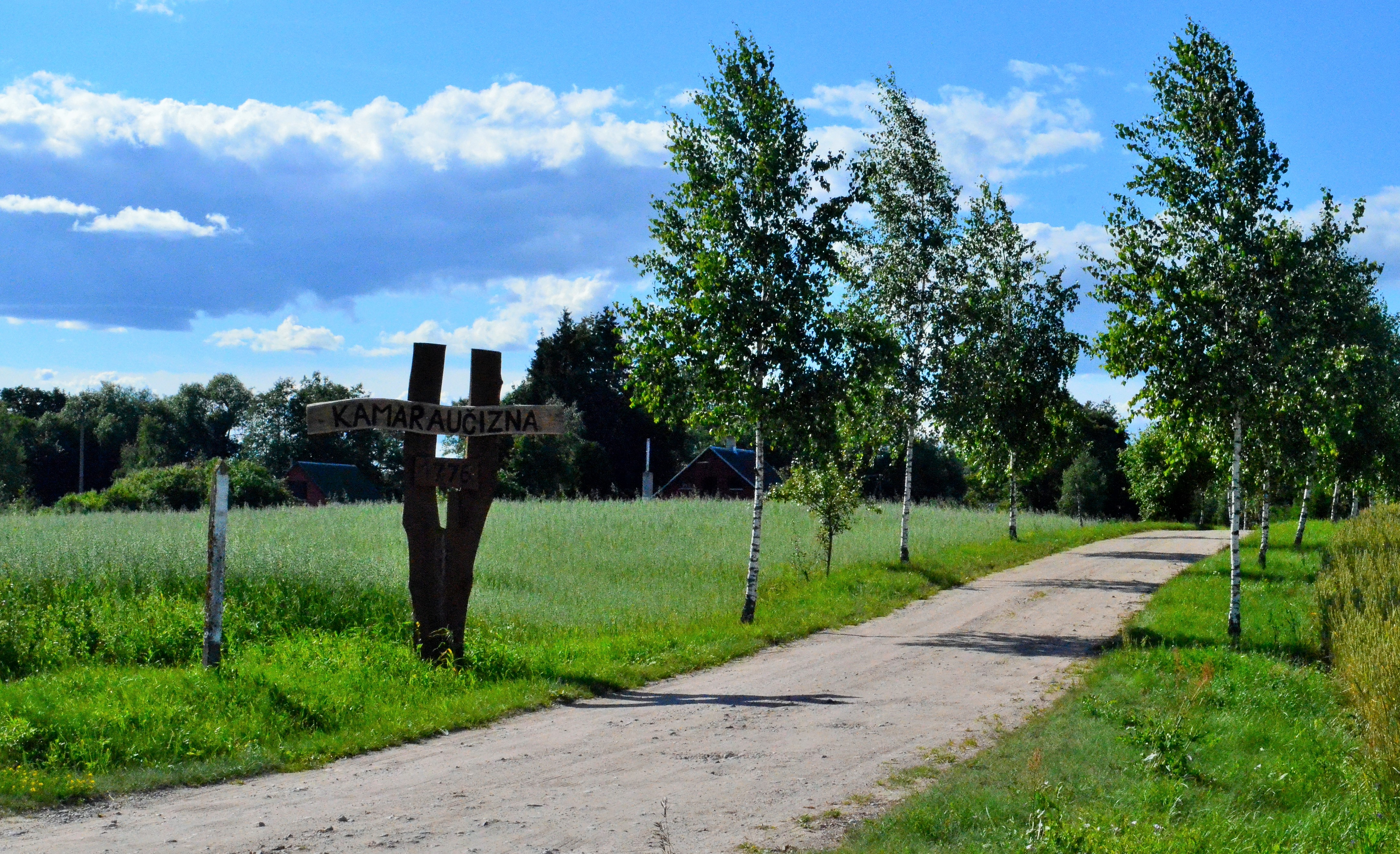 Kamaraučizna, Molėtų raj.